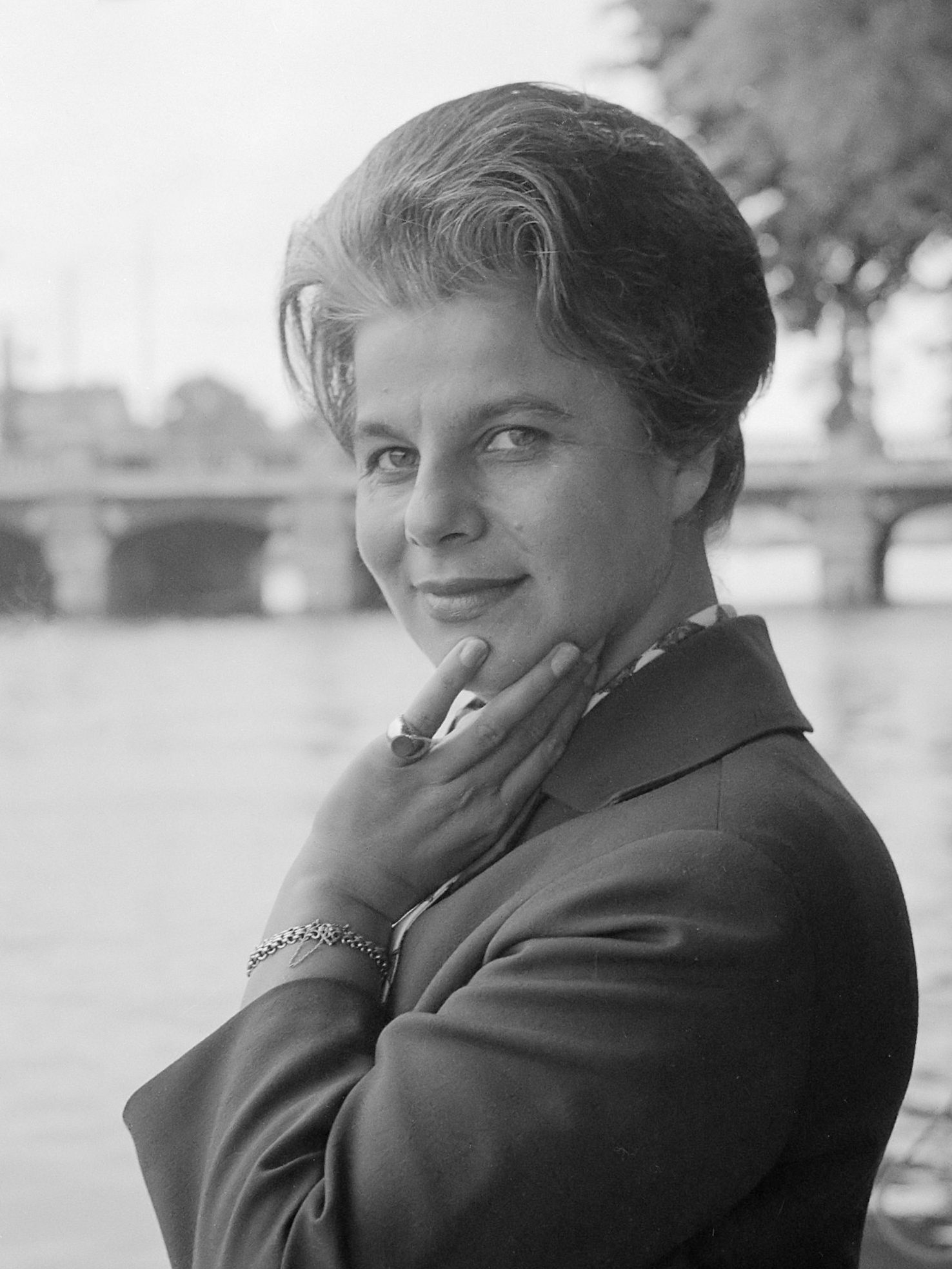 Portret van de sopraan Irmgard Seefried in Amsterdam vo deelnemen aan Holland-festival 21 juni 1962